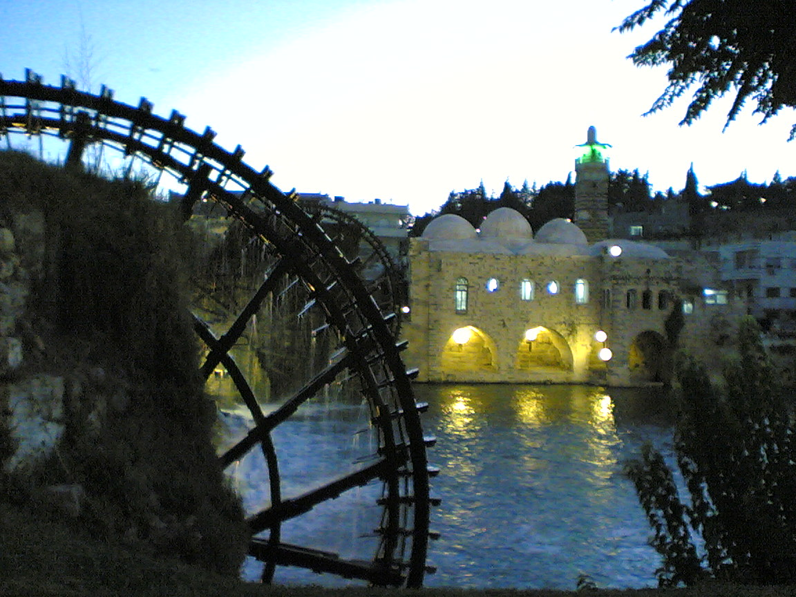 نواعير حماة بعد غروب الشمس